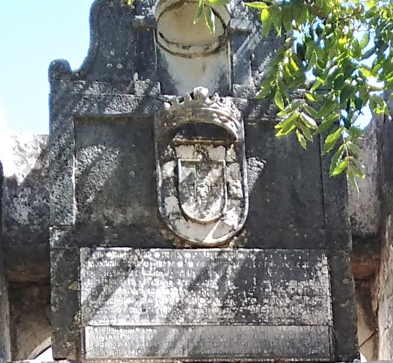 Armas Nacionais, porta-imagem e lápides inaugurais na entrada do Forte